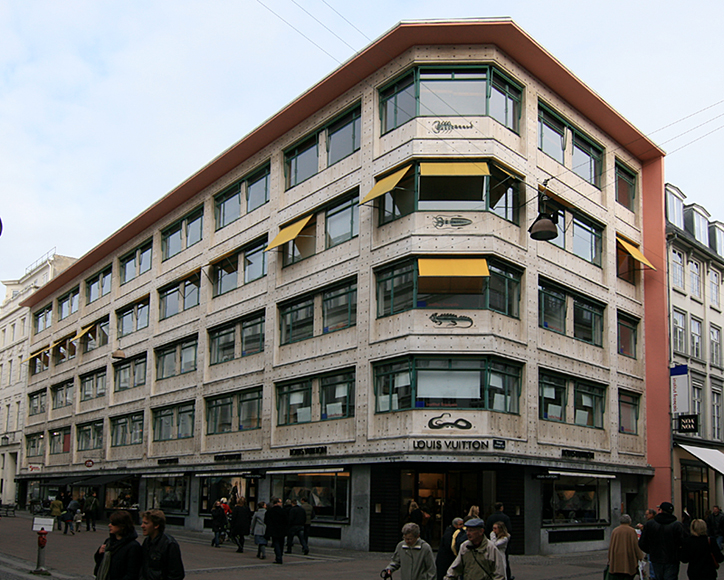 Ny Østergade 2, København. Bygget 1934. Fredet.